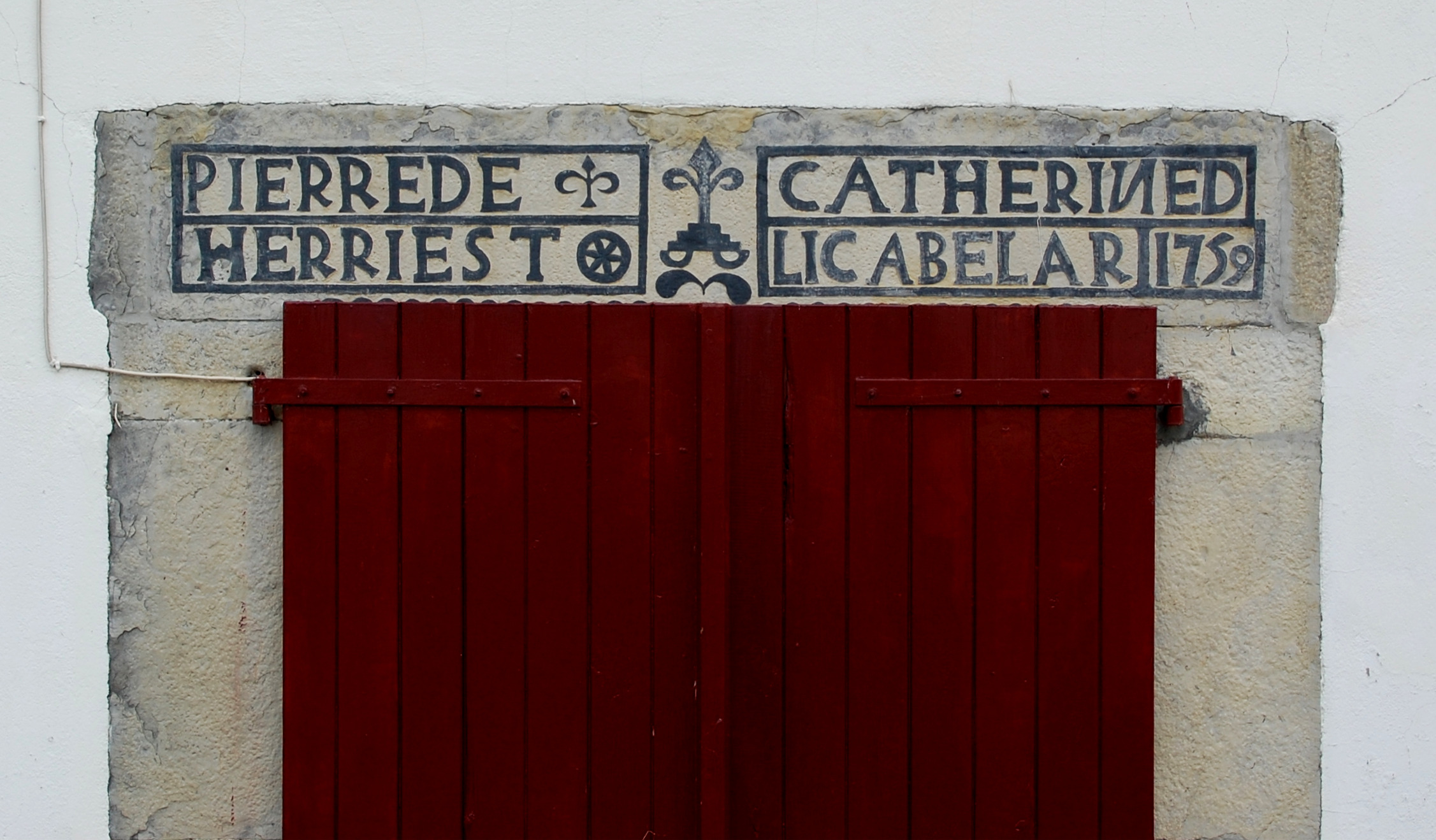 Atalburu "Pierre d'Herriesta et Catherine d'Eliçabelar, 1759"